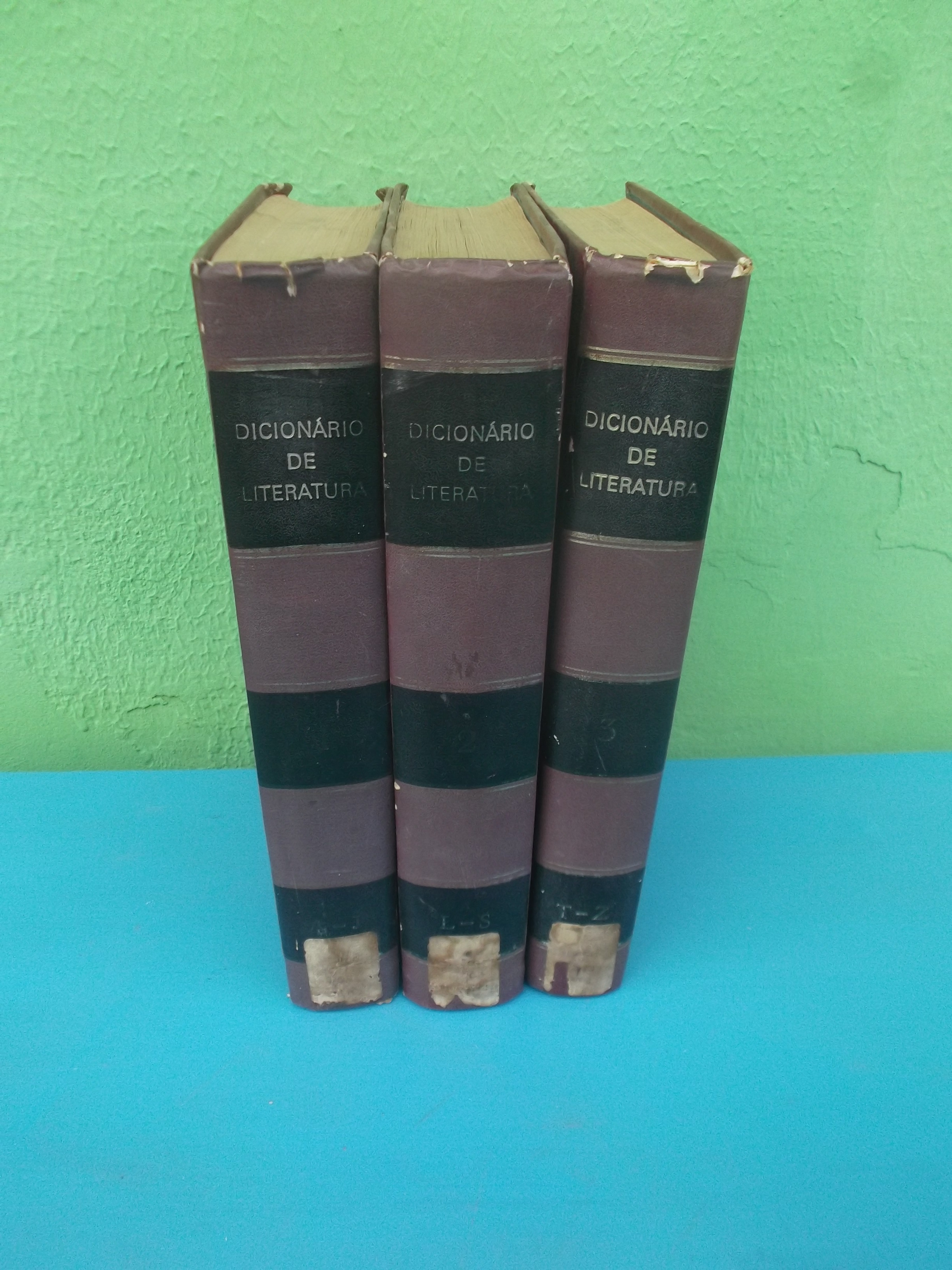 Dicionário de Literatura (Jacinto Prado Coelho), na biblioteca pública municipal de Campo Maior, no Piauí